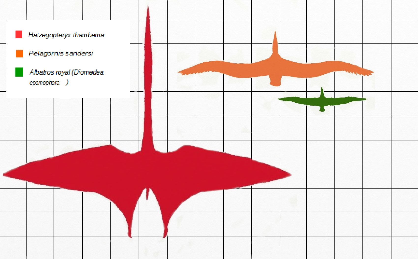 Comparaison de l'envergure des plus grands vertébrés volants actuels ou fossiles (rouge = Hatzegopteryx thambema, orange = Pelagornis sandersi et vert = Albatros royal (Diomedea epomophora))